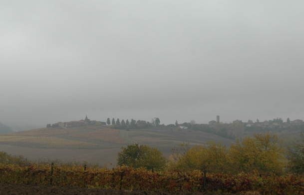 Panorama della frazione di Guazzolo